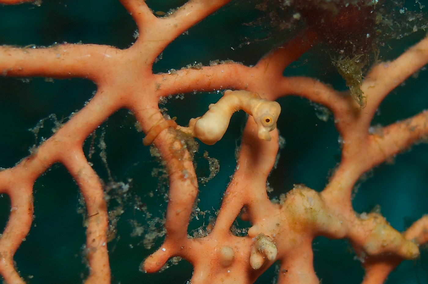 Hippocampus denise, Raja Ampat, Sorong, Indonesia